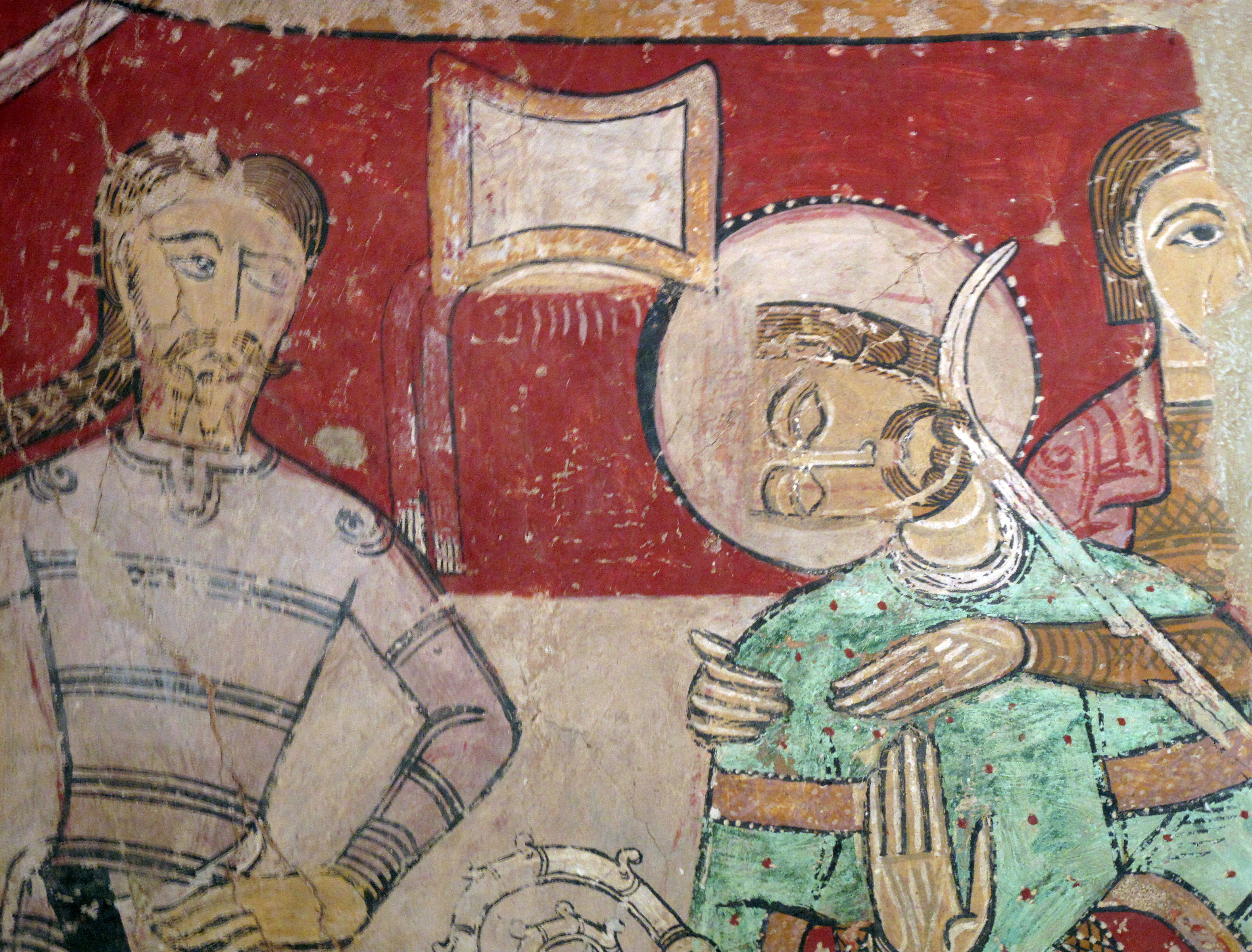 Santa Maria de Terrassa